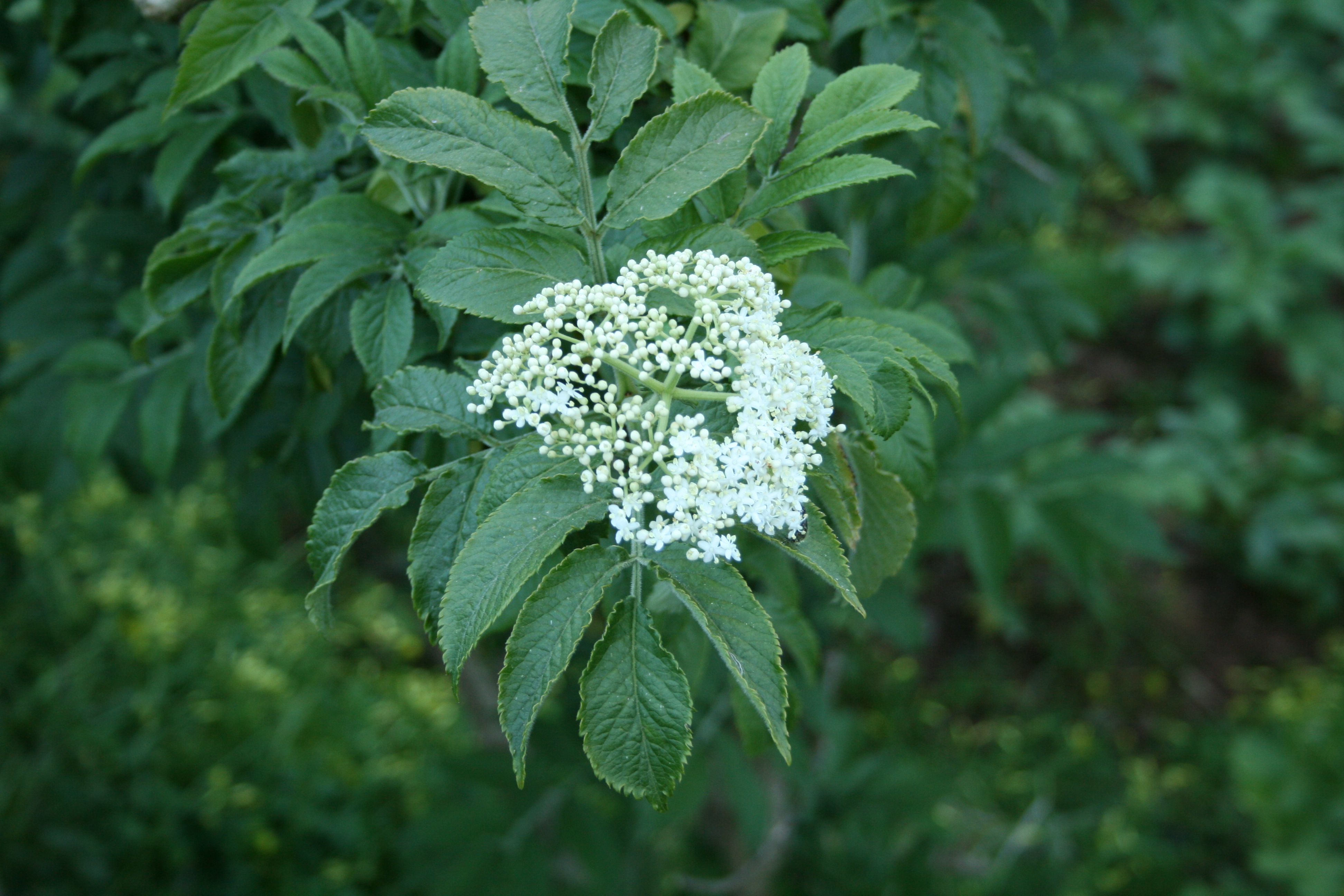 Flor y hojas de Saúco canario, Sambucus palmensis